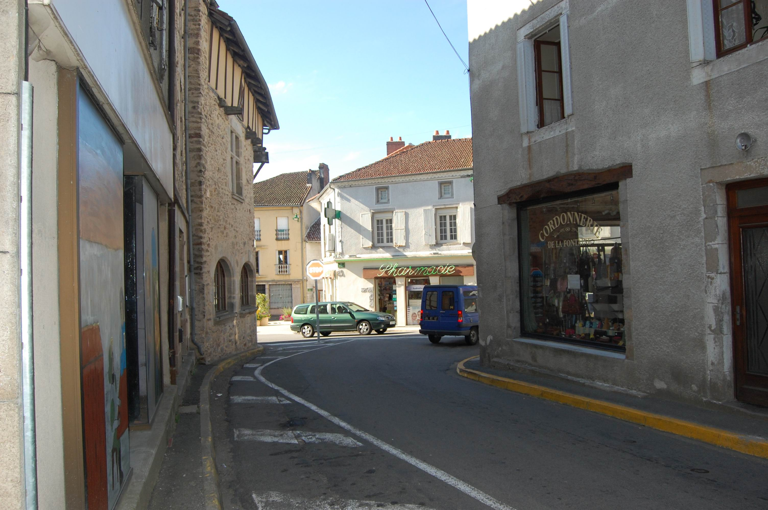 Châlus, rue Salardine